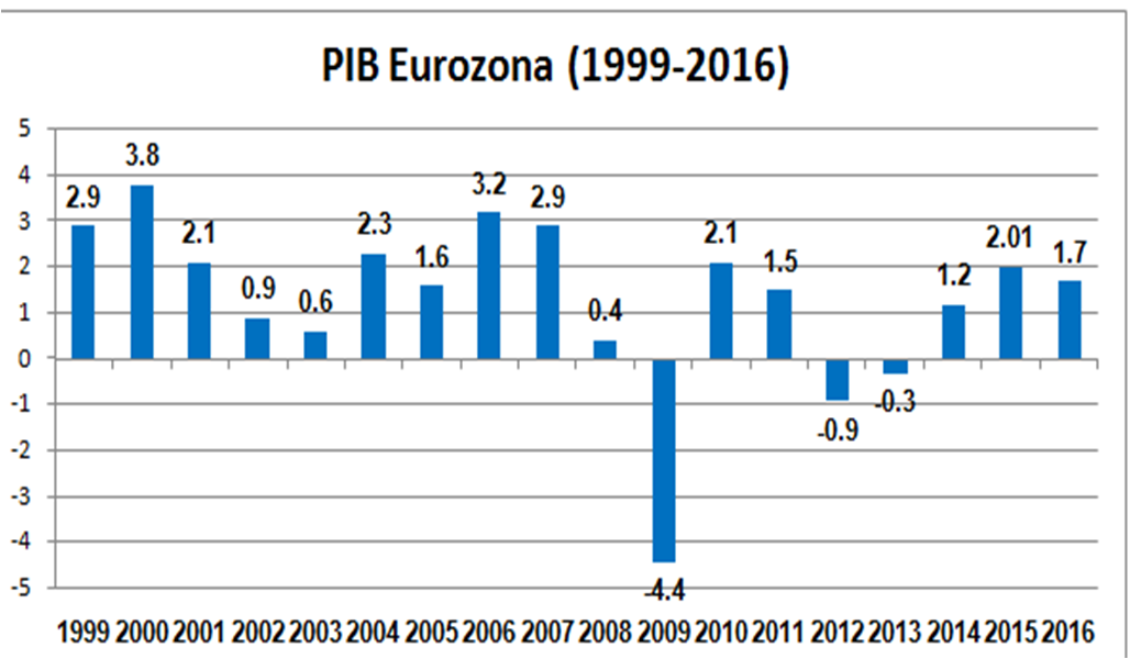 Crecimento medio anual del PIB de la Eurozona durante la última década.